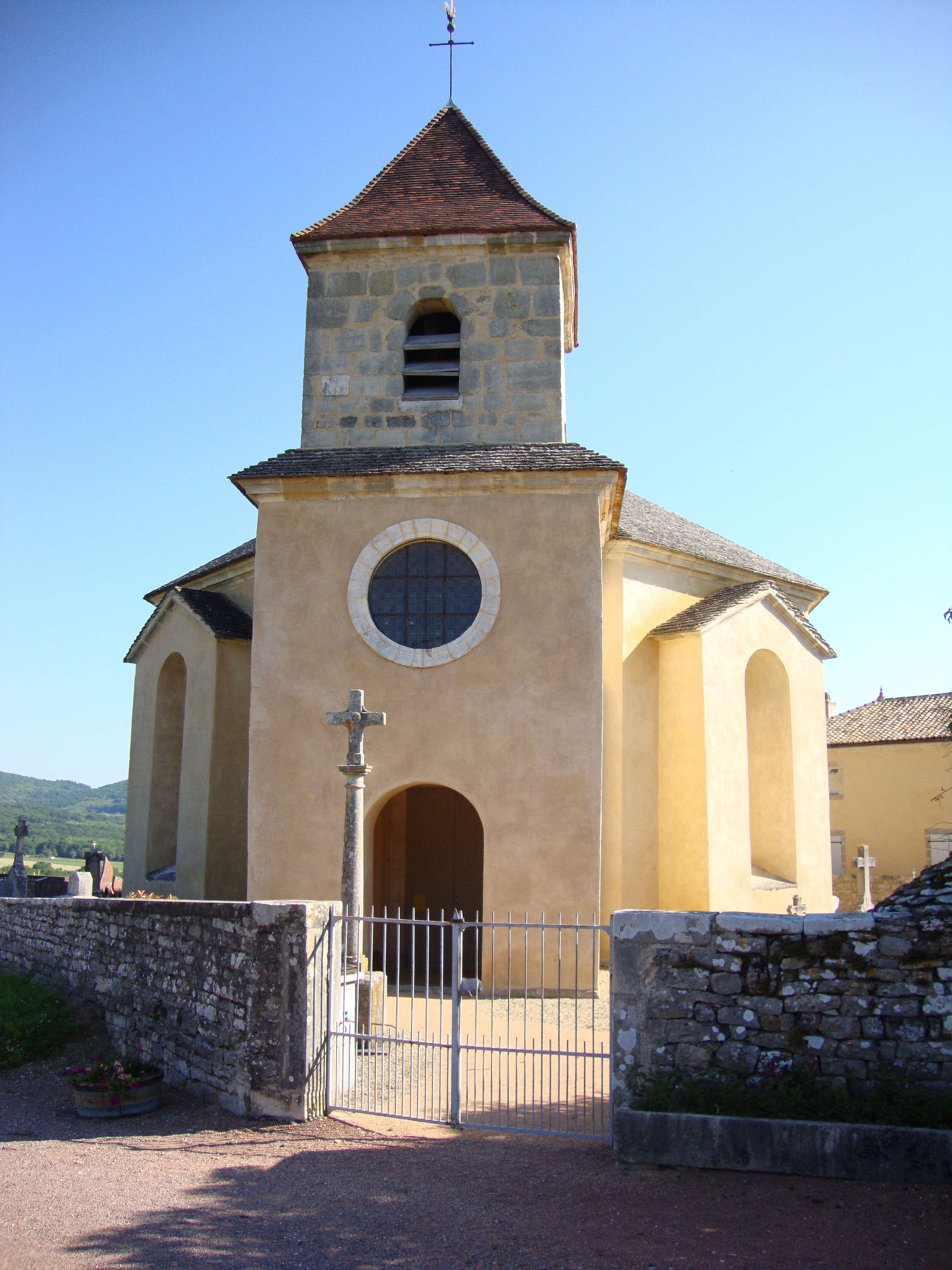 Barizey (Saône-et-Loire, Fr) église.